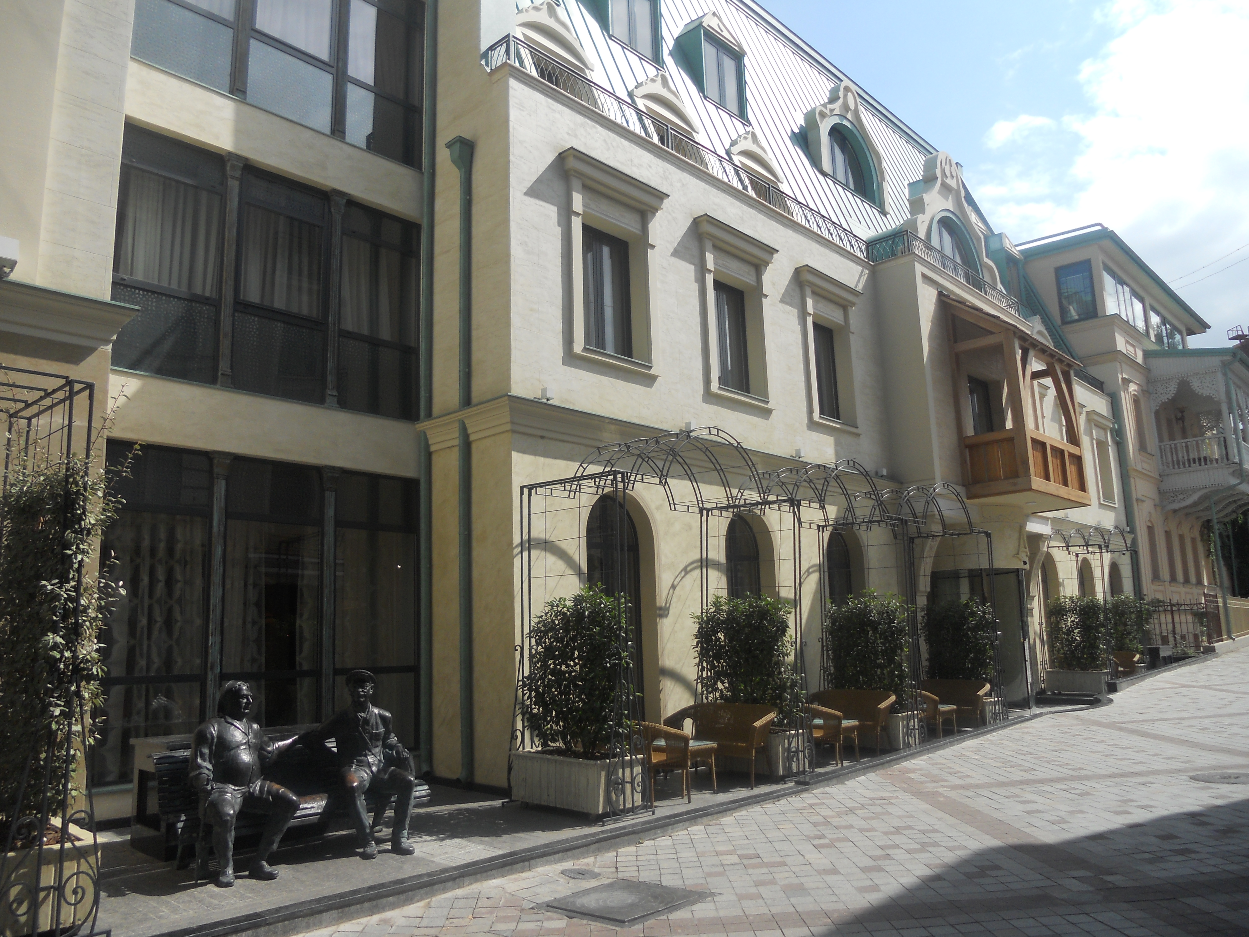 მარიონეტების თეატრი